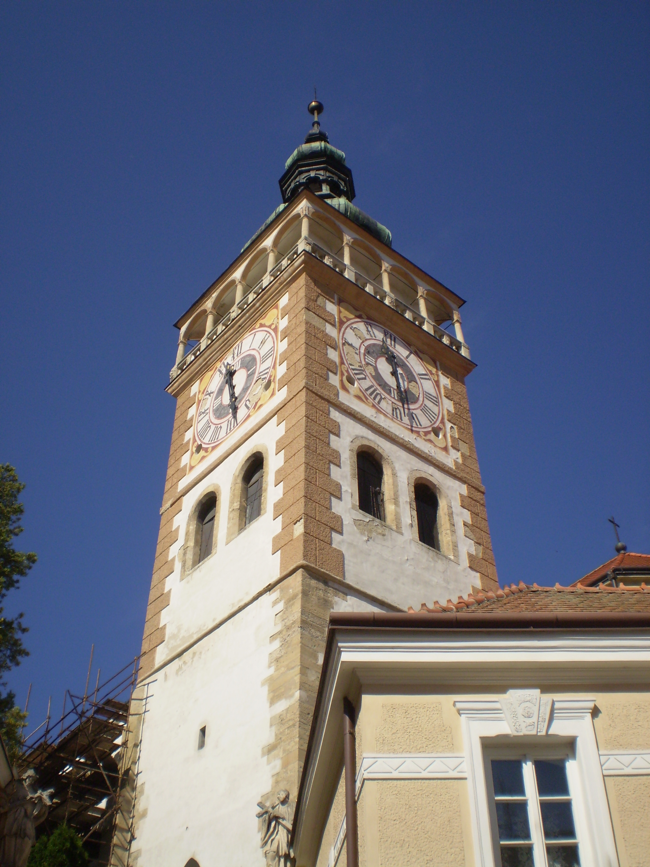 Kostel svatého Václava v Mikulově. Věž kostela.